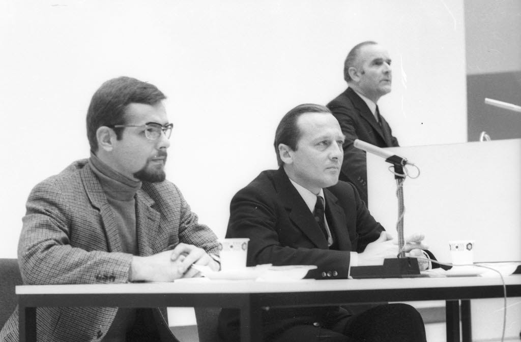 im Audimax. Der Rektor der Christian-Albrechts-Universität (CAU), Prof. Dr. Diedrich Schroeder, eröffnet die Universitätstage. Ihr zentrales Thema ist "Aspekte der Hochschulreform - Ziele, Probleme, Gefahren". Am Tisch rechts der Festredner Dr. Peter Fischer-Appelt, Präsident der Universität Hamburg.